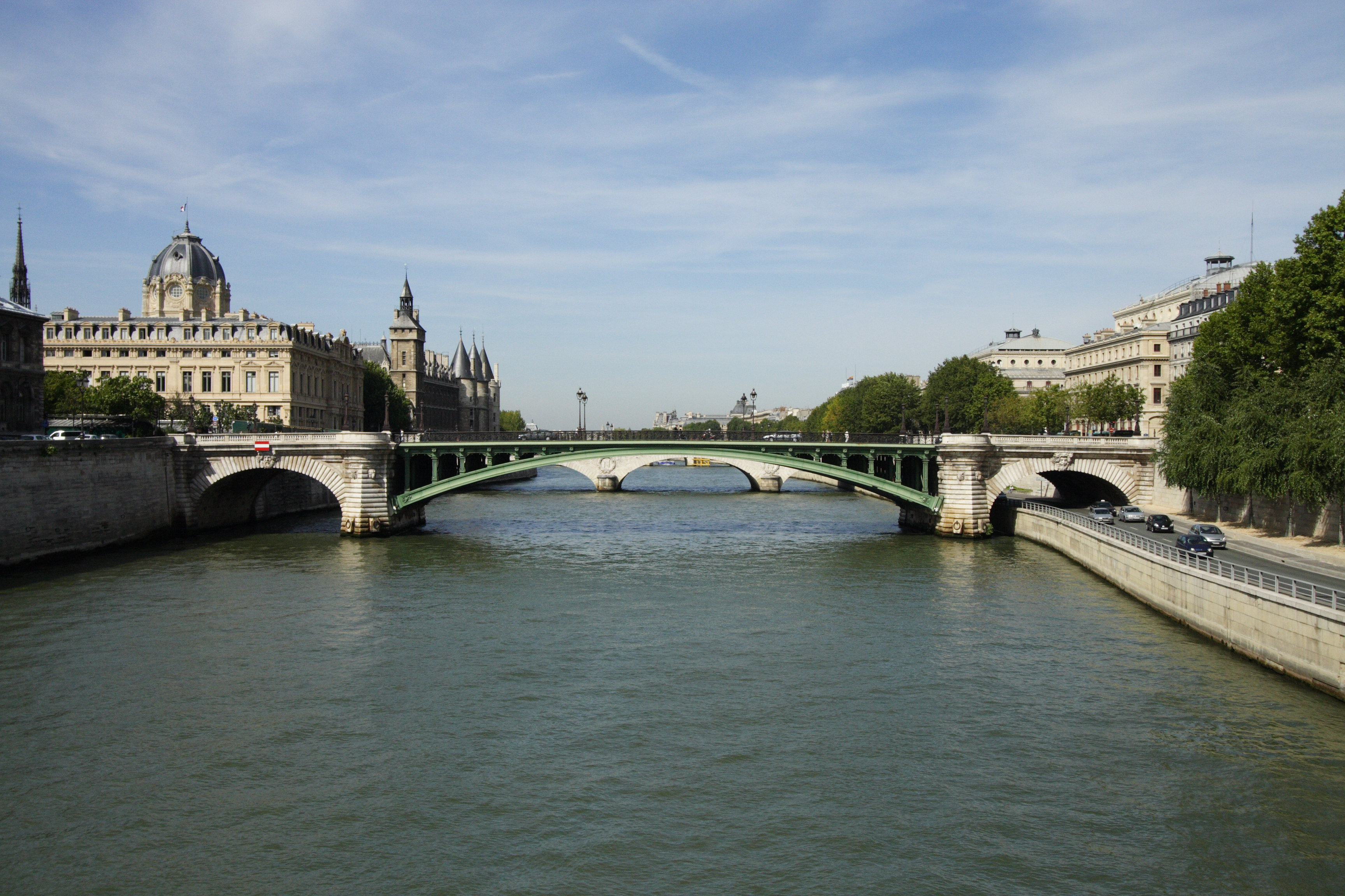 Pont Notre-Dame(Paris, France)